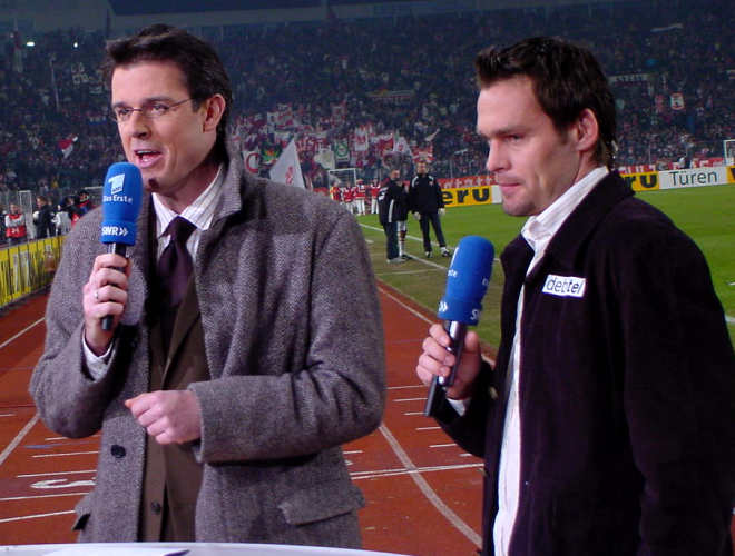 VfB-Spieler Silvio Meissner (r.) im Gottlieb-Daimler-Stadion mit Michael Antwerpes vom SWR Eigenes Bild, GNU-FDL. Zur Verfügung gestellt von Weberberg.de, der Website für Biberach. The weaver 13:55, 20. Mär 2004 (CET)